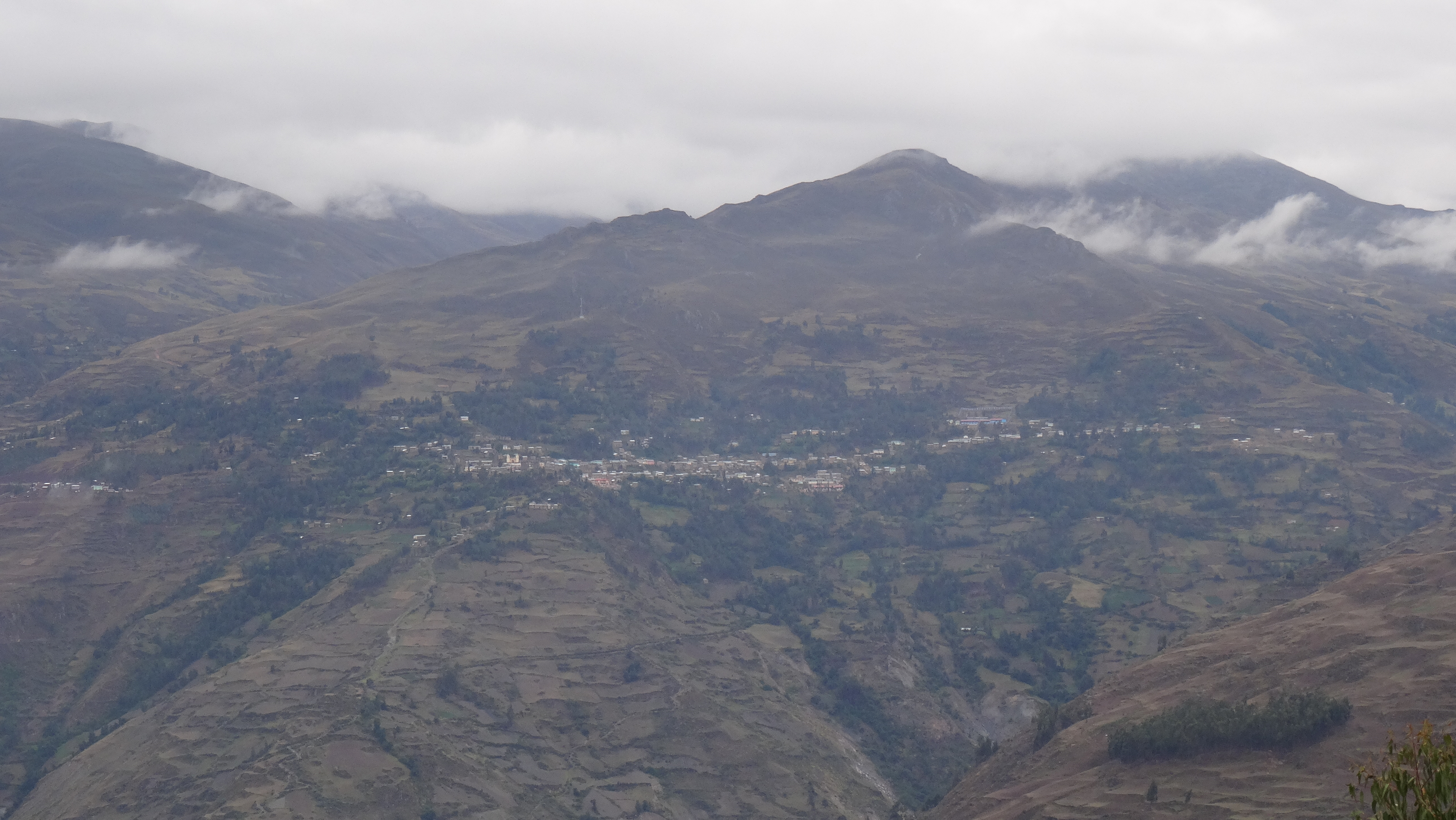 Vista de Marías desde cercanías del C.P. San Roque.